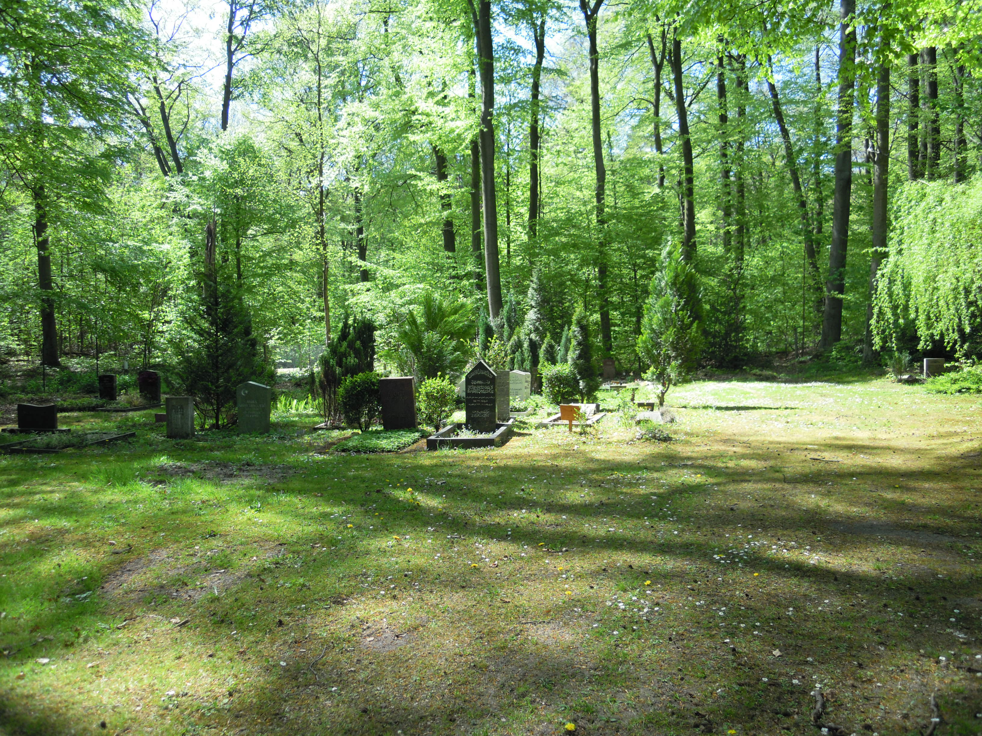 Waldfriedhof in Frankfurt-Oberrad, Burgenlandweg, Islamisches Bestattungsfeld